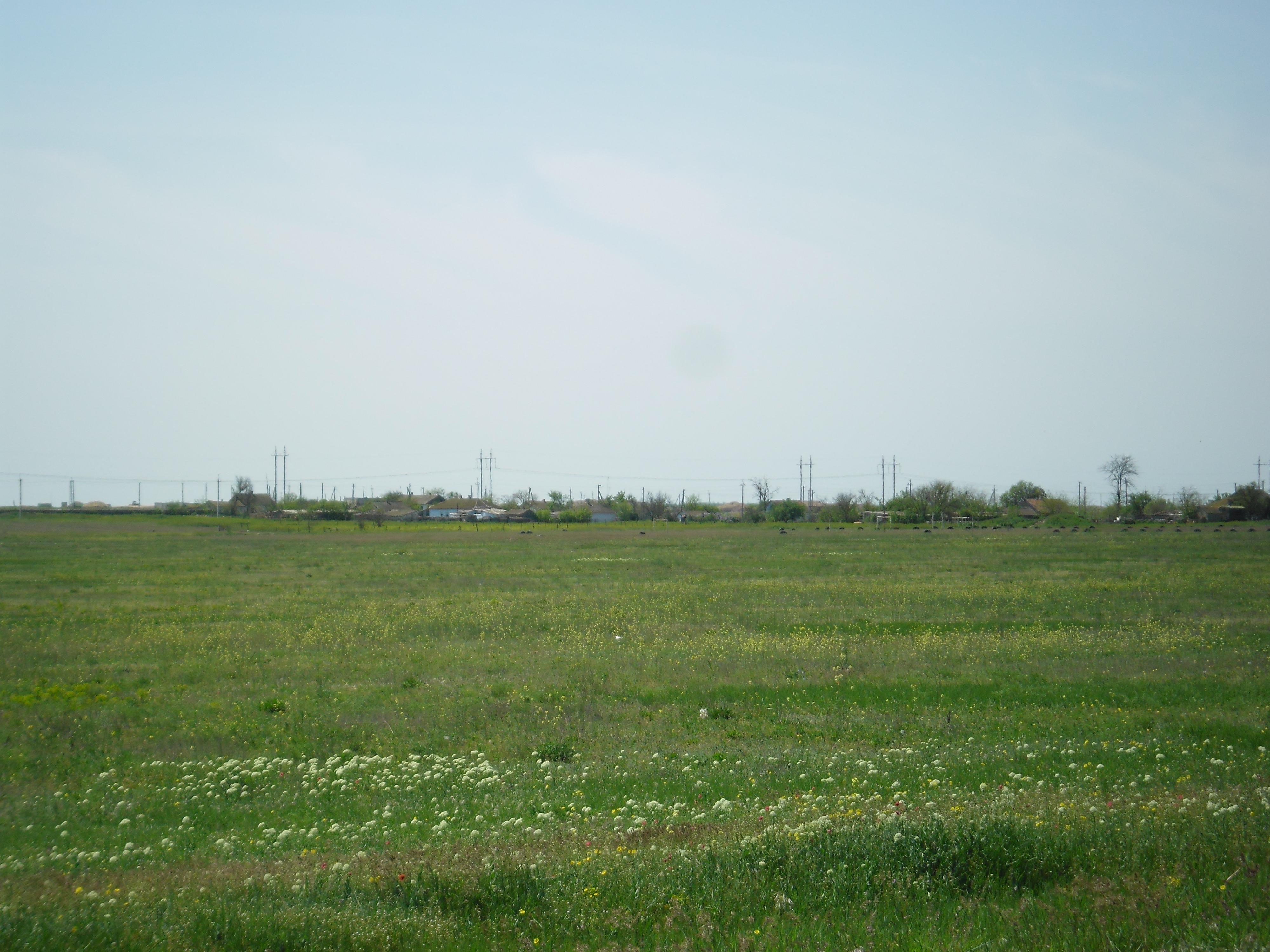 с. Открытое Первомайского р/на Крым